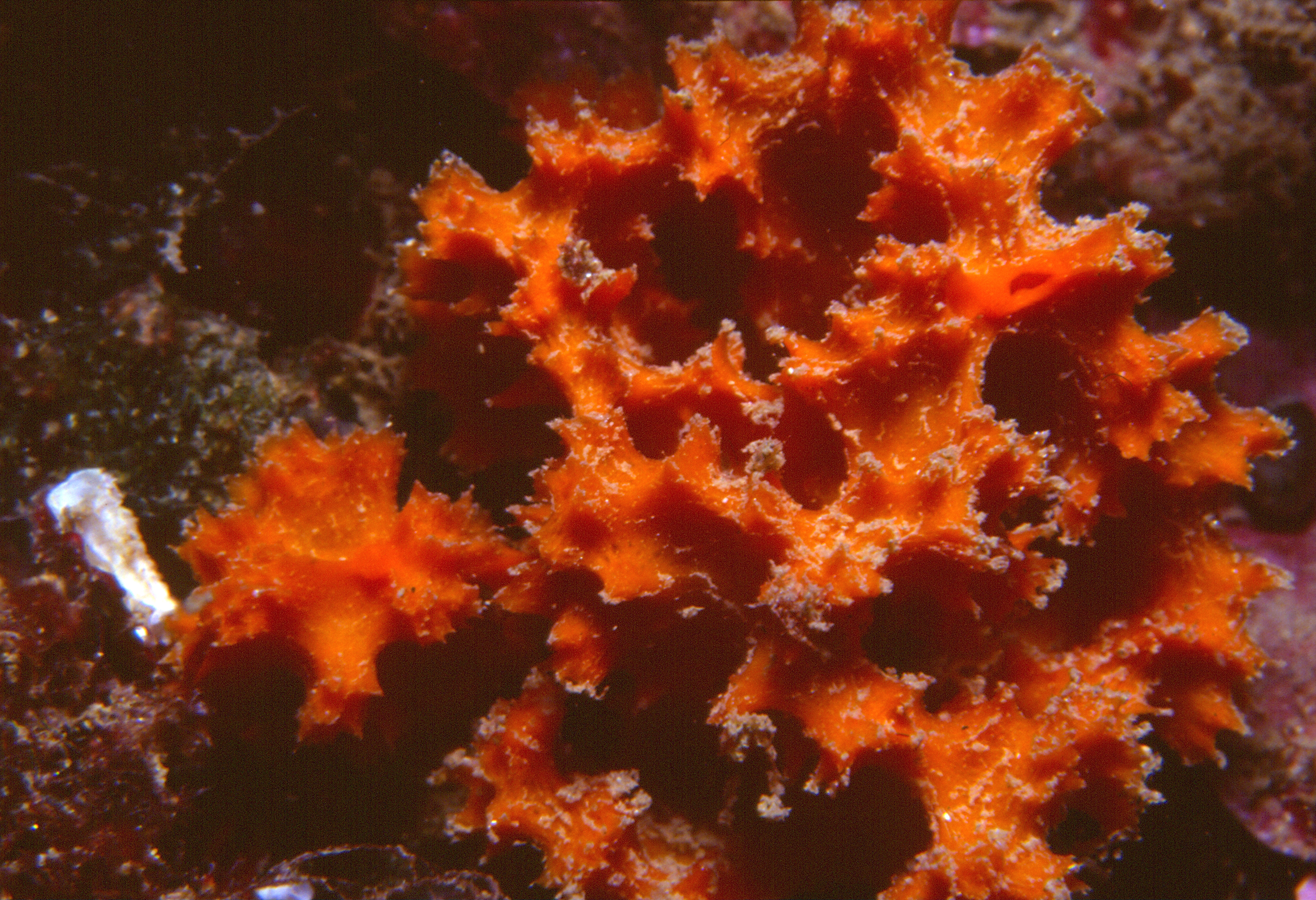 Acanthella acuta Schmidt, 1862 - Banyuls-sur-Mer : 08/83